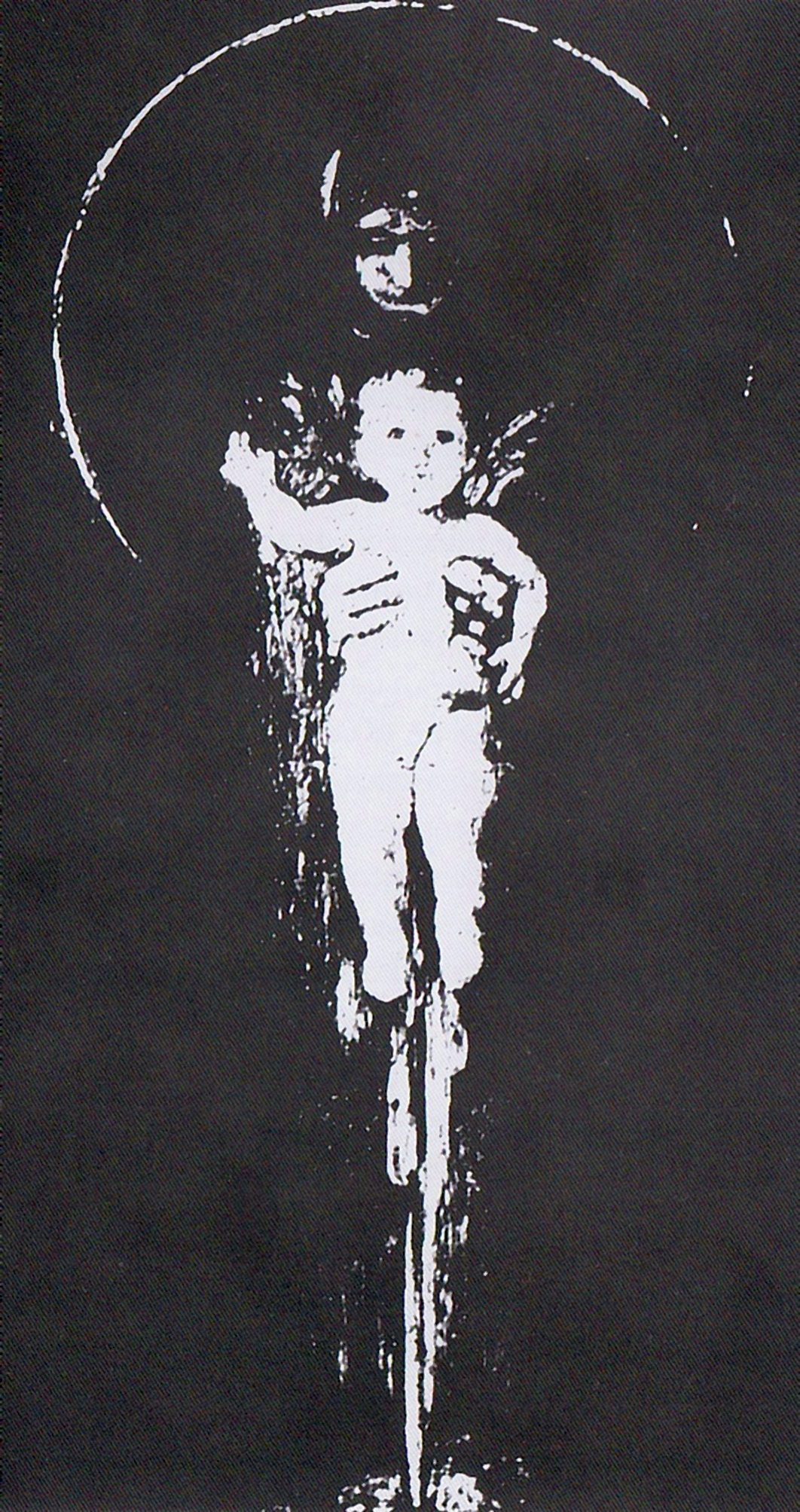 Maica Domnului - frescă în Biserica PreanyKattor, Iugoslavia